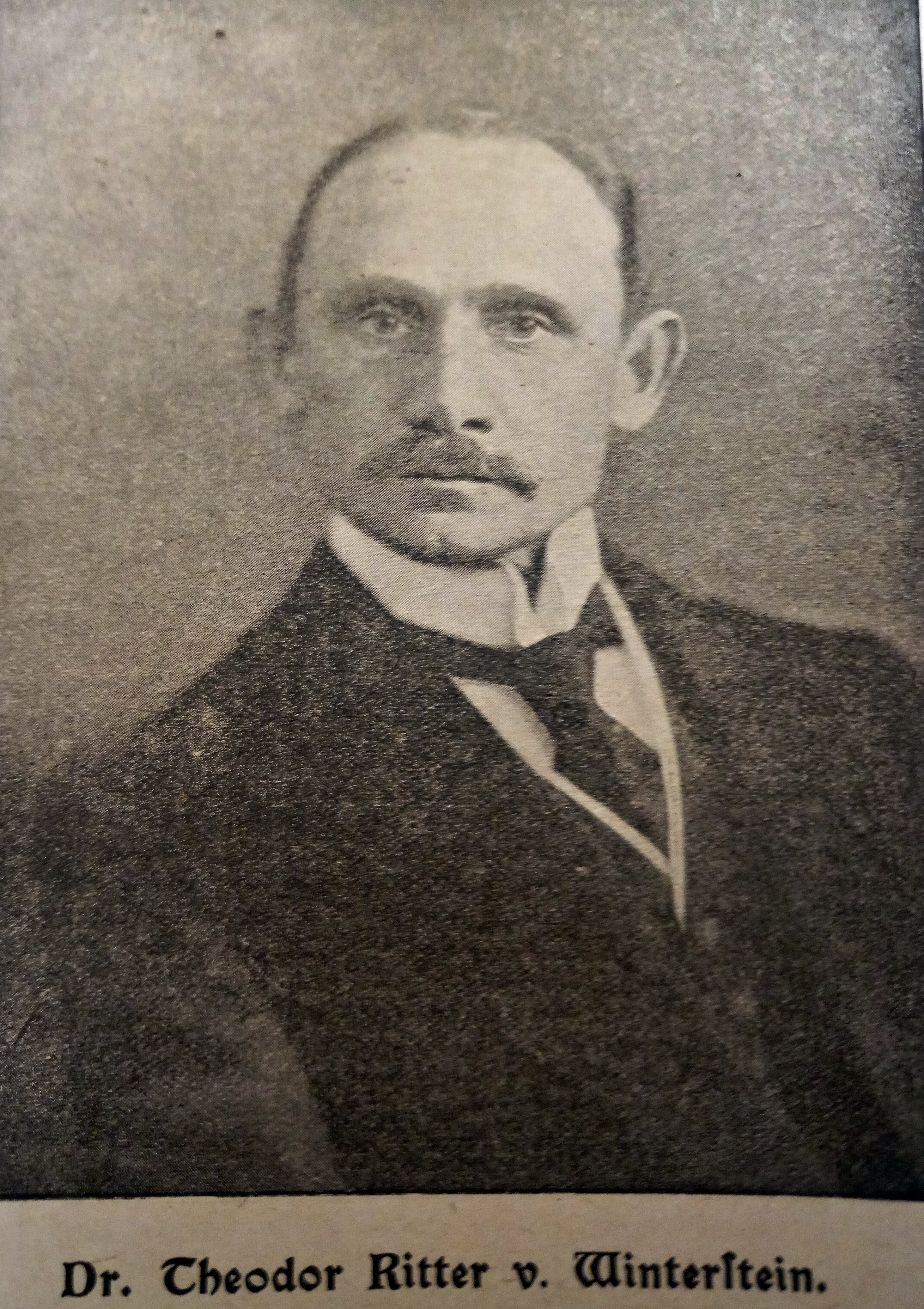 Theodor von Winterstein (1861-1945), Regierungspräsident der Pfalz